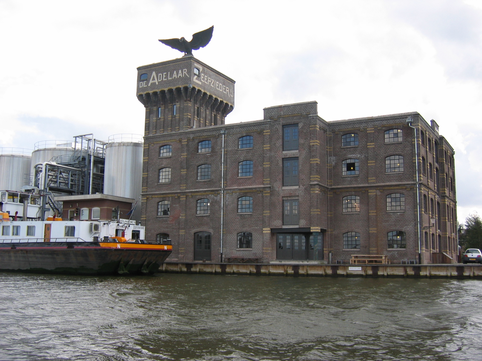 Projecten aan de Zaan Boottocht 4 september 2009 BNA Kring Amsterdam-Kennemerland